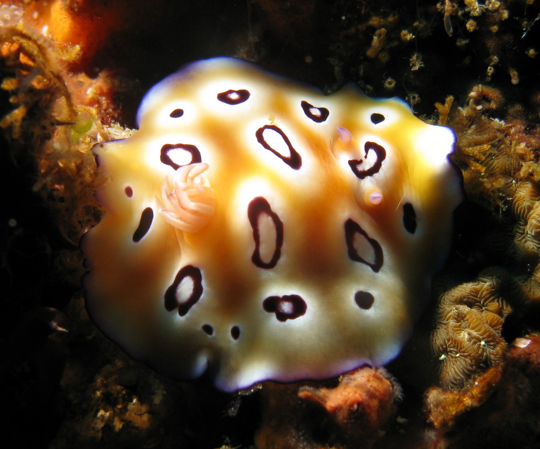 Chromodoris leopardus, Indonesia.